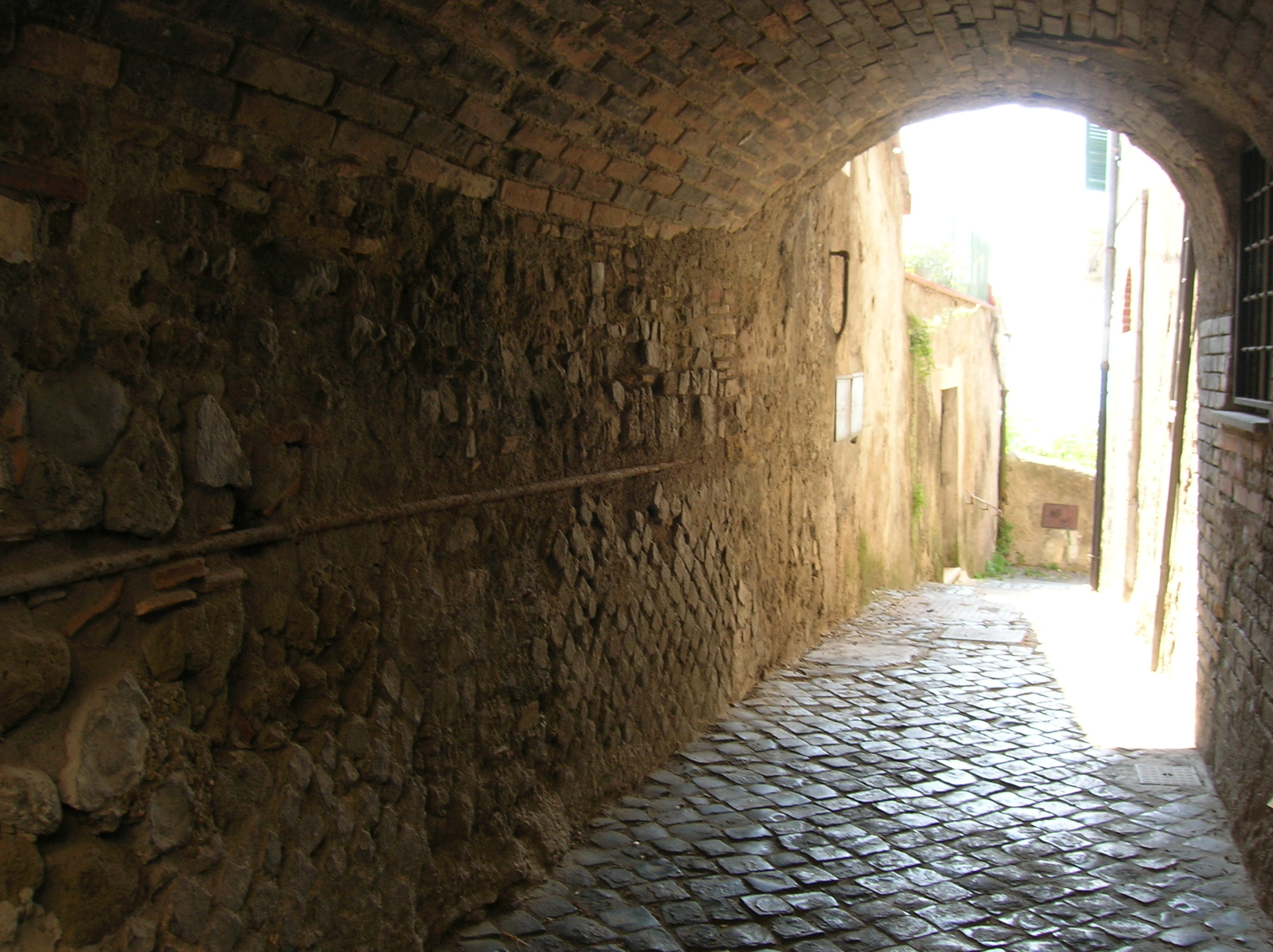 Vicolo Grondarella - Anguillara Sabazia, Lazio, Italia